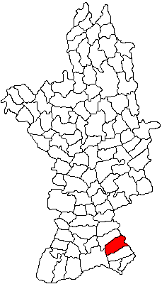 Categorie:Hărţi ale judeţului Olt